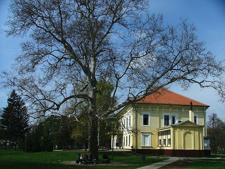 Poljoprivredna skola sa domom ucenika Futog